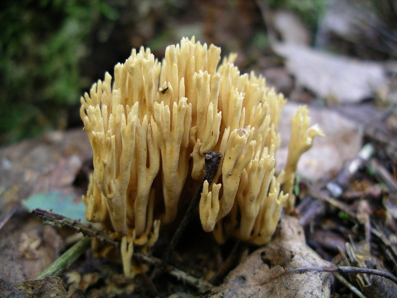 Gelsvažalis šakočius (Ramaria abietina)